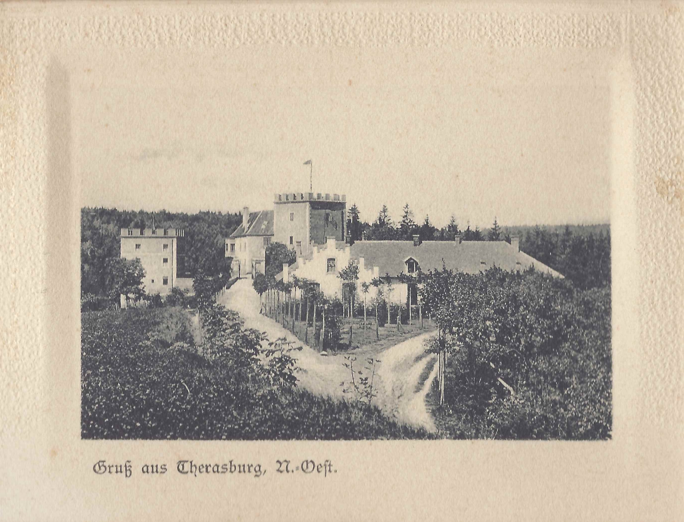 Gruß aus Therasburg, N.Oest., Handnotizrückseite "Schloss Therasburg im Waldviertel", Bleistiftnotiz "Karlo Attems, Toni Attems", die Beflaggung deutet auf Anwesenheit des Maximilian Grafen von Attems-Gilleis, neu beflanzte Kastanienallee gut sichtbar